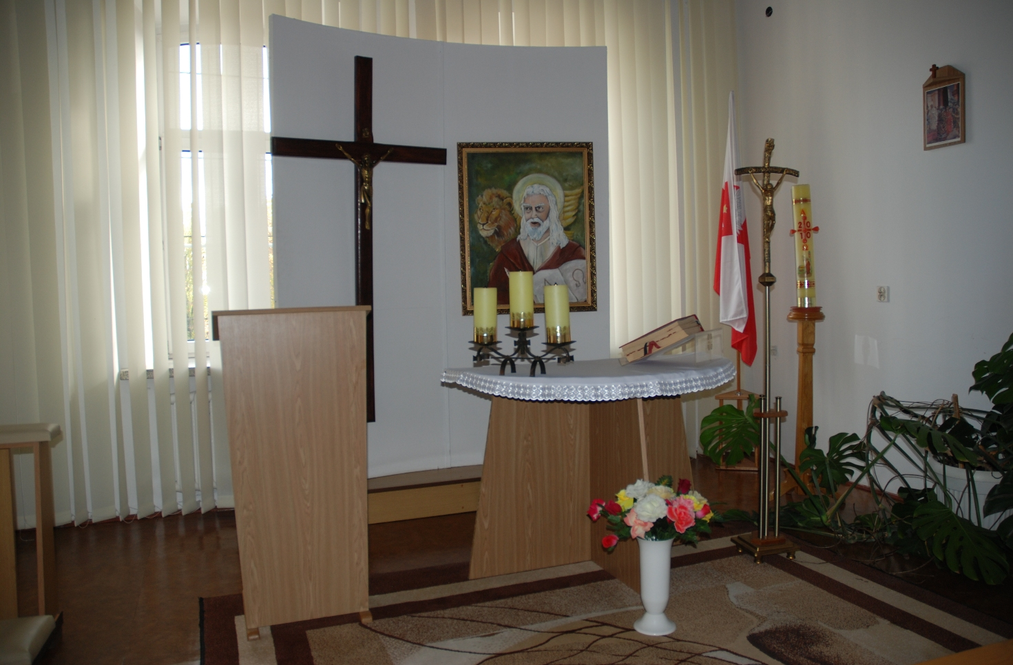 Przasnysz, 2016 r. Kaplica Ośrodka Radioelektronicznego garnizonu Przasnysz